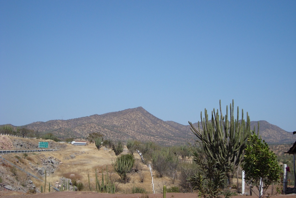 Valle de Apatzingan — en Tepalcatepec, Michoacán.